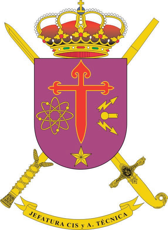 Escudo de la Jefatura de los Sistemas de Información Telecomunicaciones y Asistencia Técnica (JCISAT)